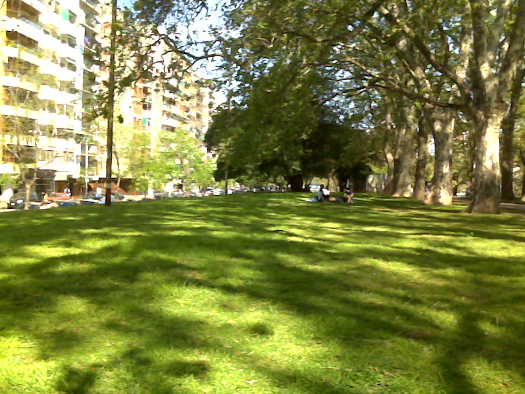 Emilio Mitre Avenue, along Parque Chacabuco, Buenos Aires.